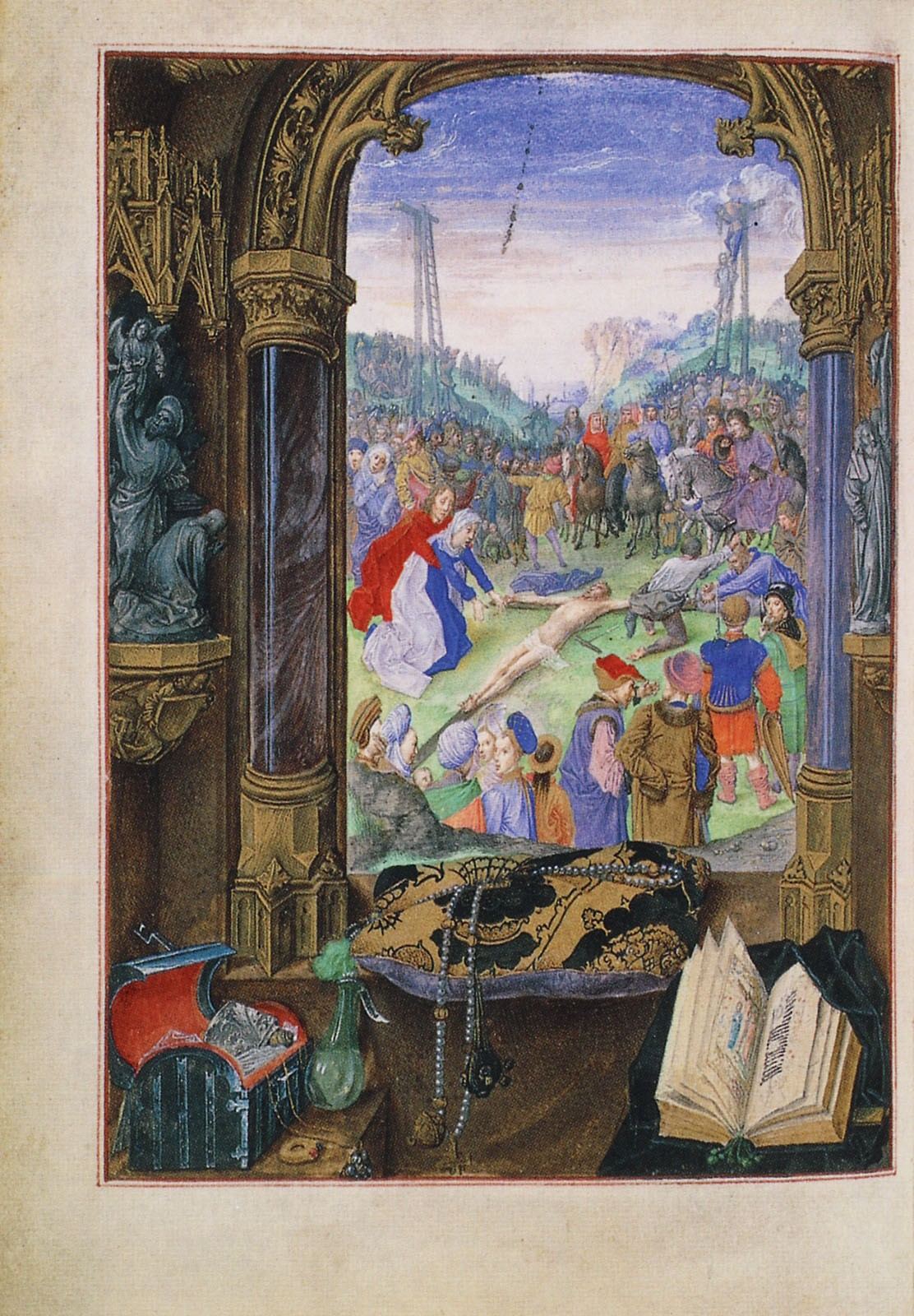 Wien, Österreichische Nationalbibliothek, cod. 1857, Stundenbuch der Maria von Burgund. In: Franz Unterkirchner (Hrsg.): Das Stundenbuch der Maria von Burgund. Codex Vindobonensis 1857 der Österreichischen Nationalbibliothek (Glanzlichter der Buchkunst), Darmstadt 1993.